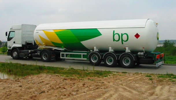 Полуприцеп-цистерна для транспортировки газа (СУГ)